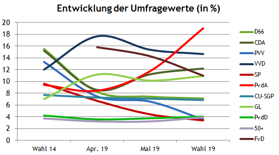 Europawahl Niederlande 2019 Umfragen